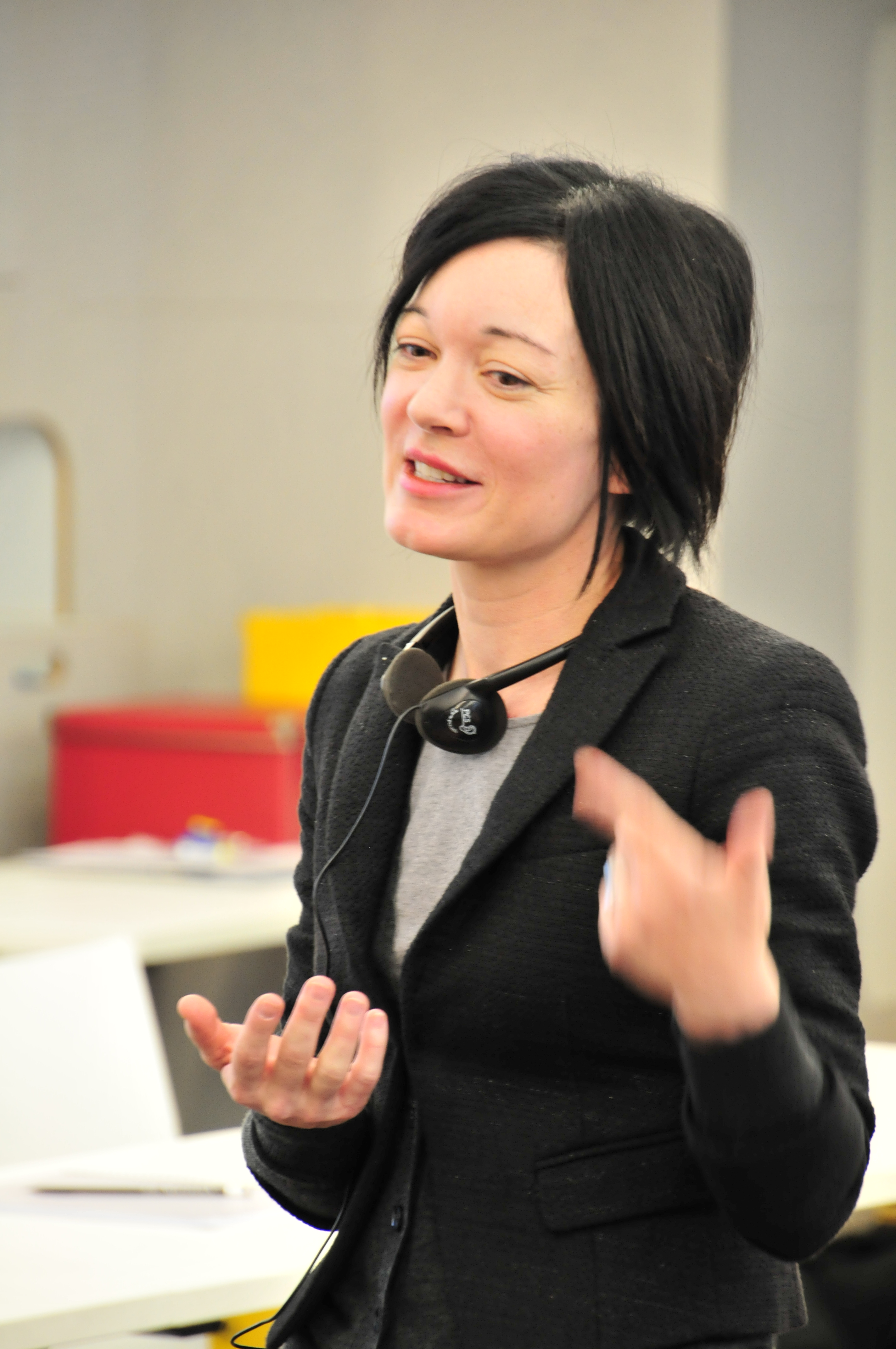 Diskussion zum Bildfilter in Hannover Personality rights warningAlthough this work is freely licensed or in the public domain, the person(s) shown may have rights that legally restrict certain re-uses unless those depicted consent to such uses. In these cases, a model release or other evidence of consent could protect you from infringement claims.